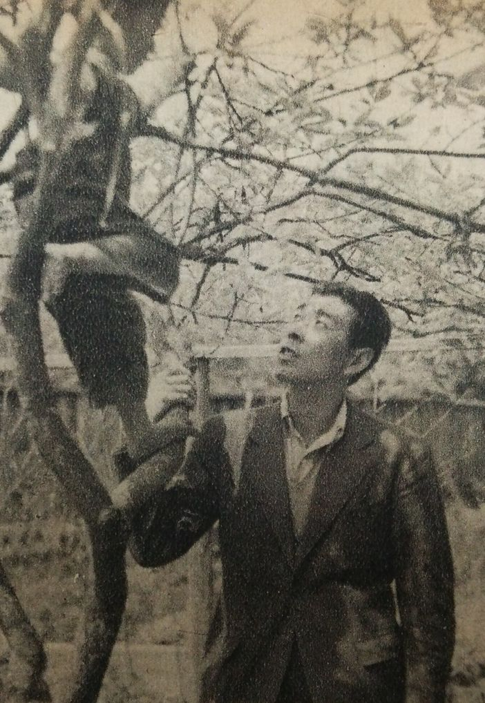 山岸二郎